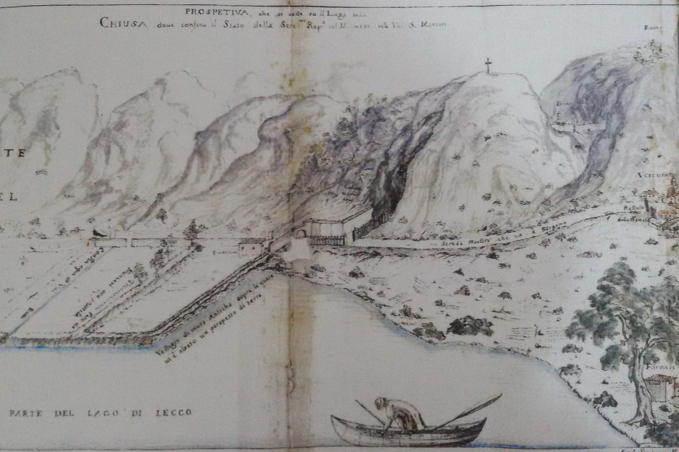 Immagine della dogana presente a Vercurago fino al 1797